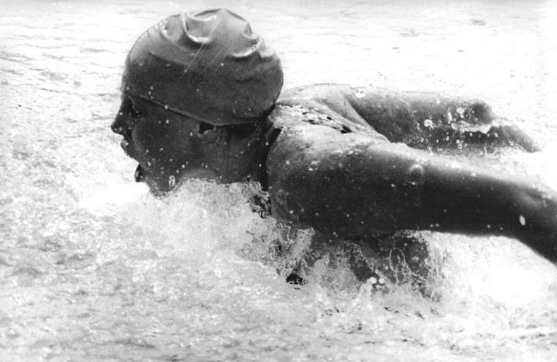 Anne-Kathrin Leucht ADN-ZB Gahlbeck 17-8-75-Leeds-Großbritannien: Erneuter DDR-Erfolg beim Europapokal im Schwimmen der Frauen-Anne-Kathrin Leucht (DDR-Foto von einem früheren Wettkampf) gewann über 100 m und 200 m Schmetterling (in 1:03,54 bzw. 2:18,32) sowie in der 4 x 100-m-Lagenstaffel. Auch der vierte Wettbewerk um den Europacup der Schwimmerinnen endete am 16.8.1975 im "International Pool"" von Leeds mit einem DDR-Erfolg (135 Punkte). Auf den Plätzen folgten die Niederlande (85) und die UdSSR (78).